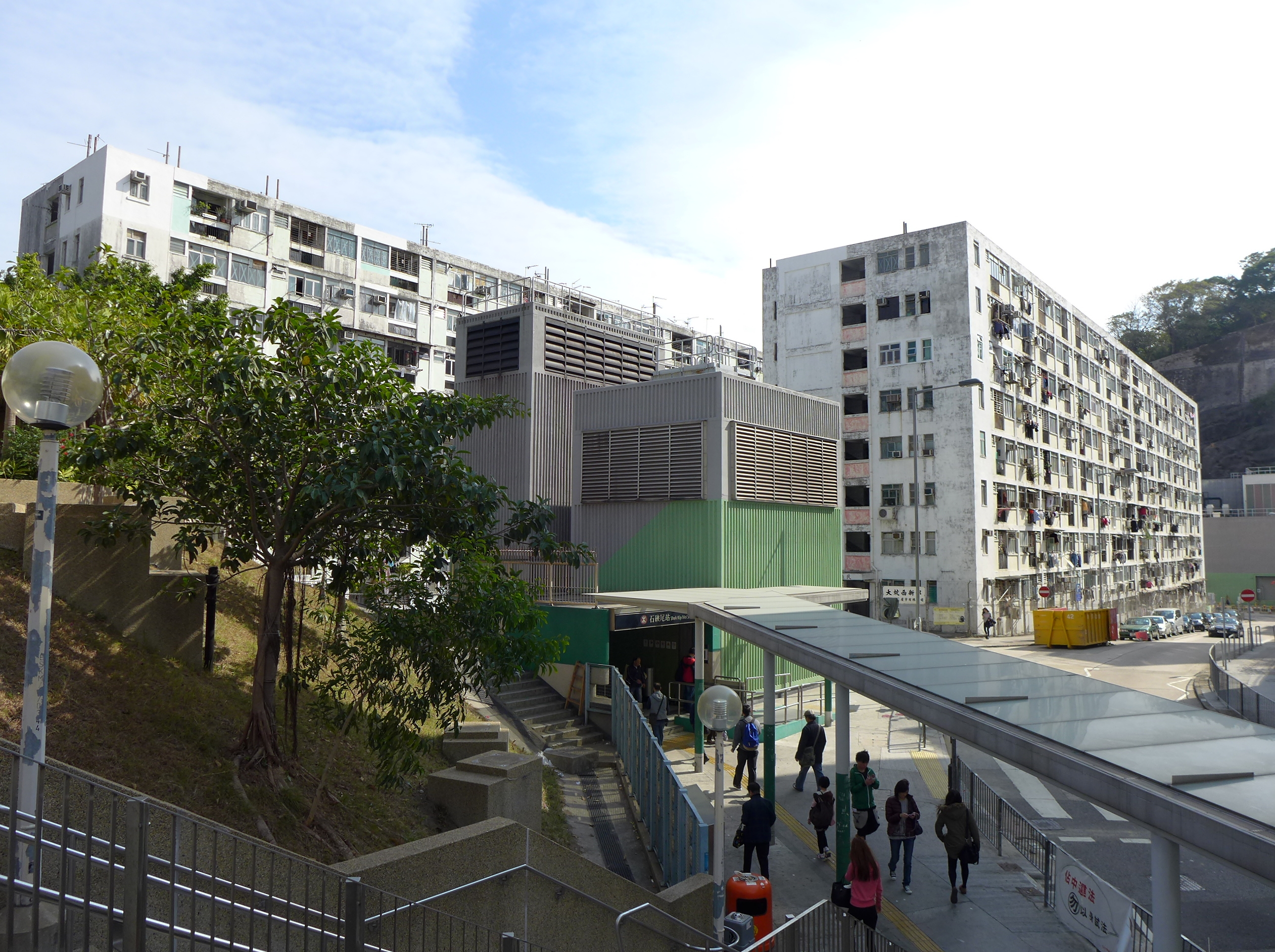 Tai Hang Sai Estate